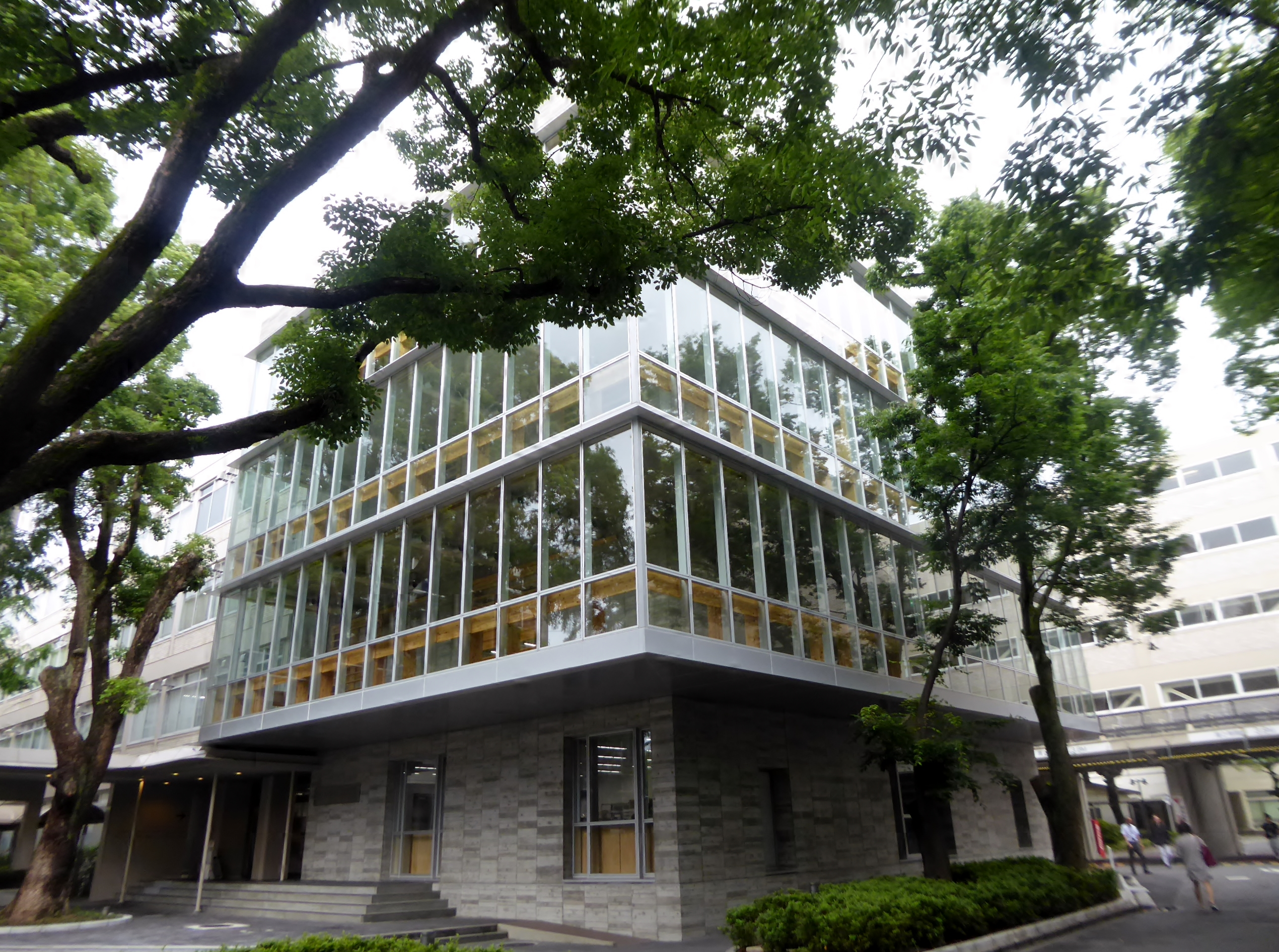 関西大学第四学舎1号館を撮影。